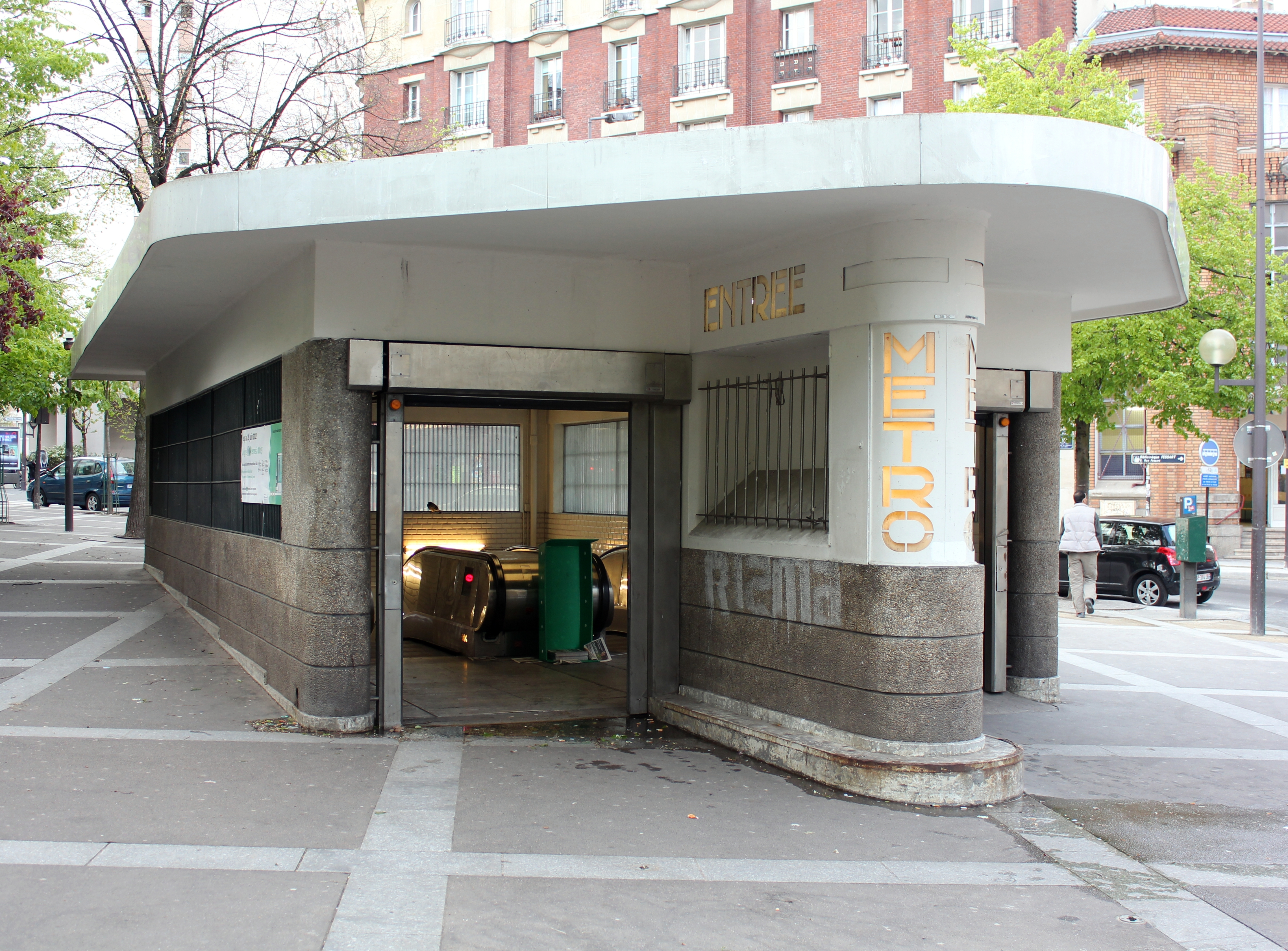 Paris Metro 7bis Place des Fêtes Eingang